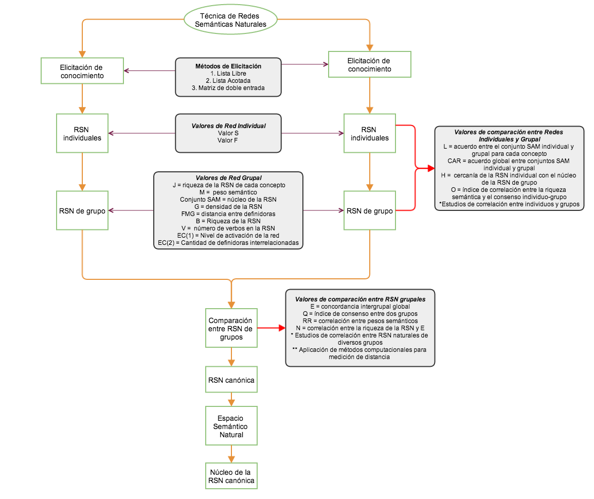 La Técnica de Redes Semánticas Naturales permite realizar un análisis cuantitativo mediante diversas medidas.